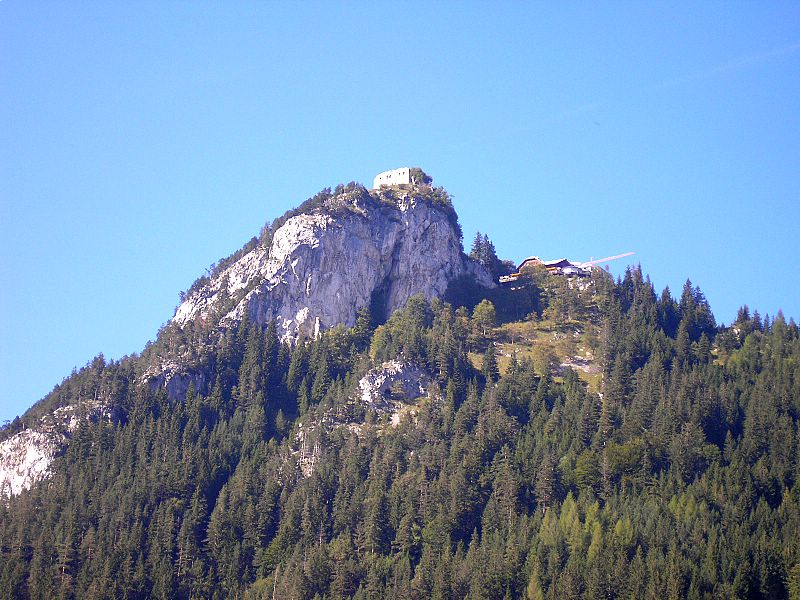 Burg Falkenstein bei Pfronten (Allgäu). Gesamtansicht von Süden. Eigene Aufnahme, Sept. 2006 / Falkenstein castle near Pfronten (Bavaria). Total view from the south. Own photo, Sept. 2006